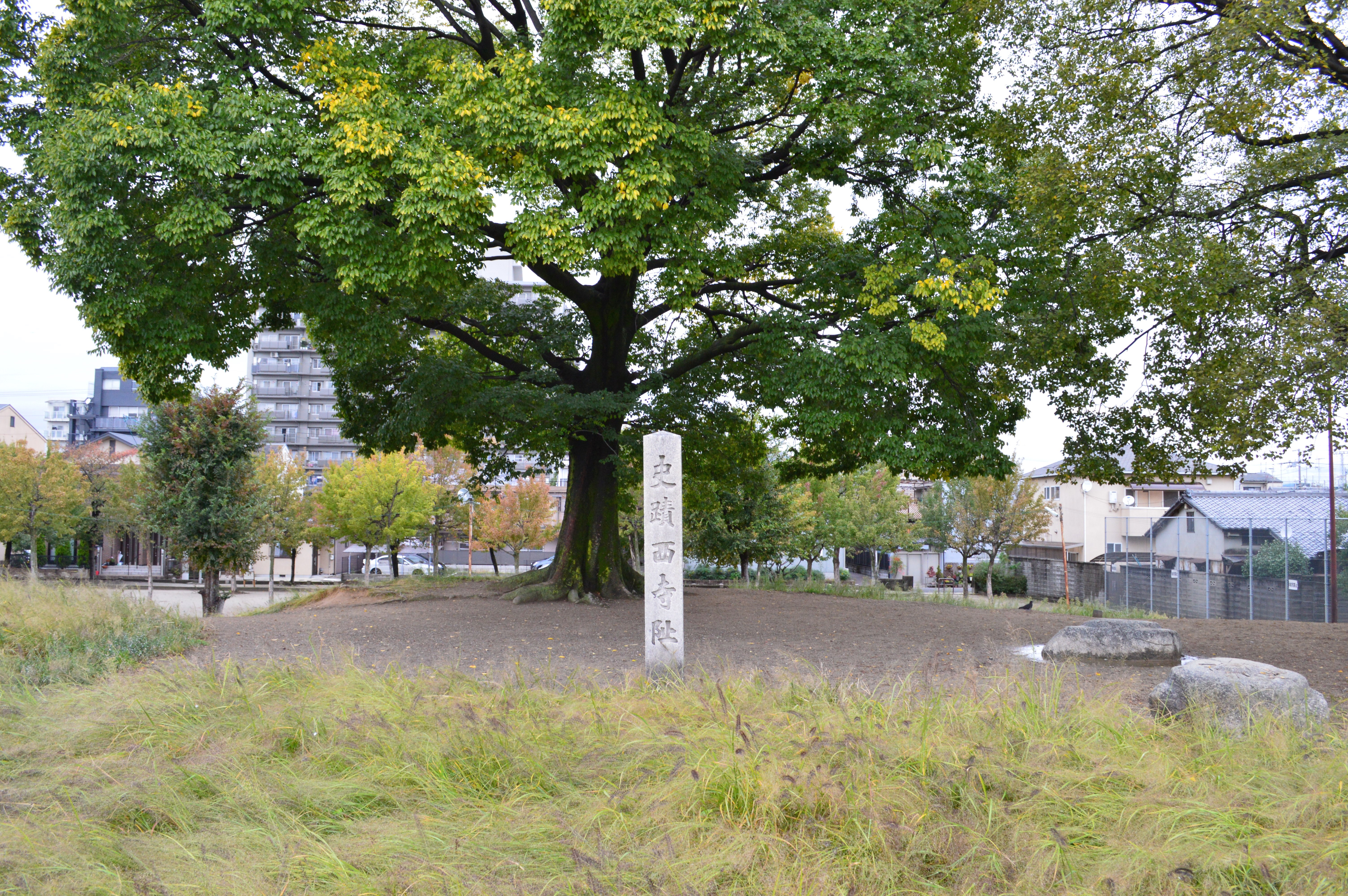 西寺跡 石碑